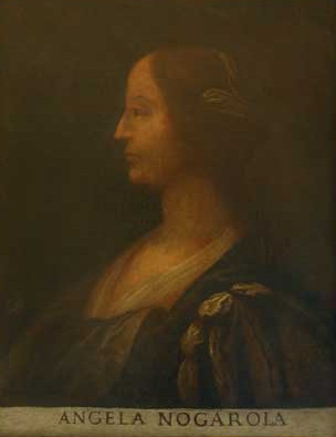 Ritratto di Angela Nogarola